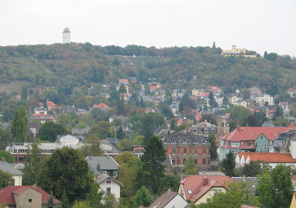 Radebeul aus der Vogelperspektive (links oben: Wasserturm, rechts oben: Friedensburg).